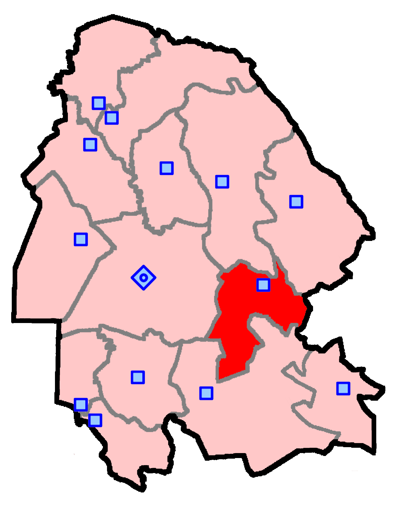 حوزهٔ انتخاباتی رامهرمز و رامشیر برای انتخابات مجلس شورای اسلامی